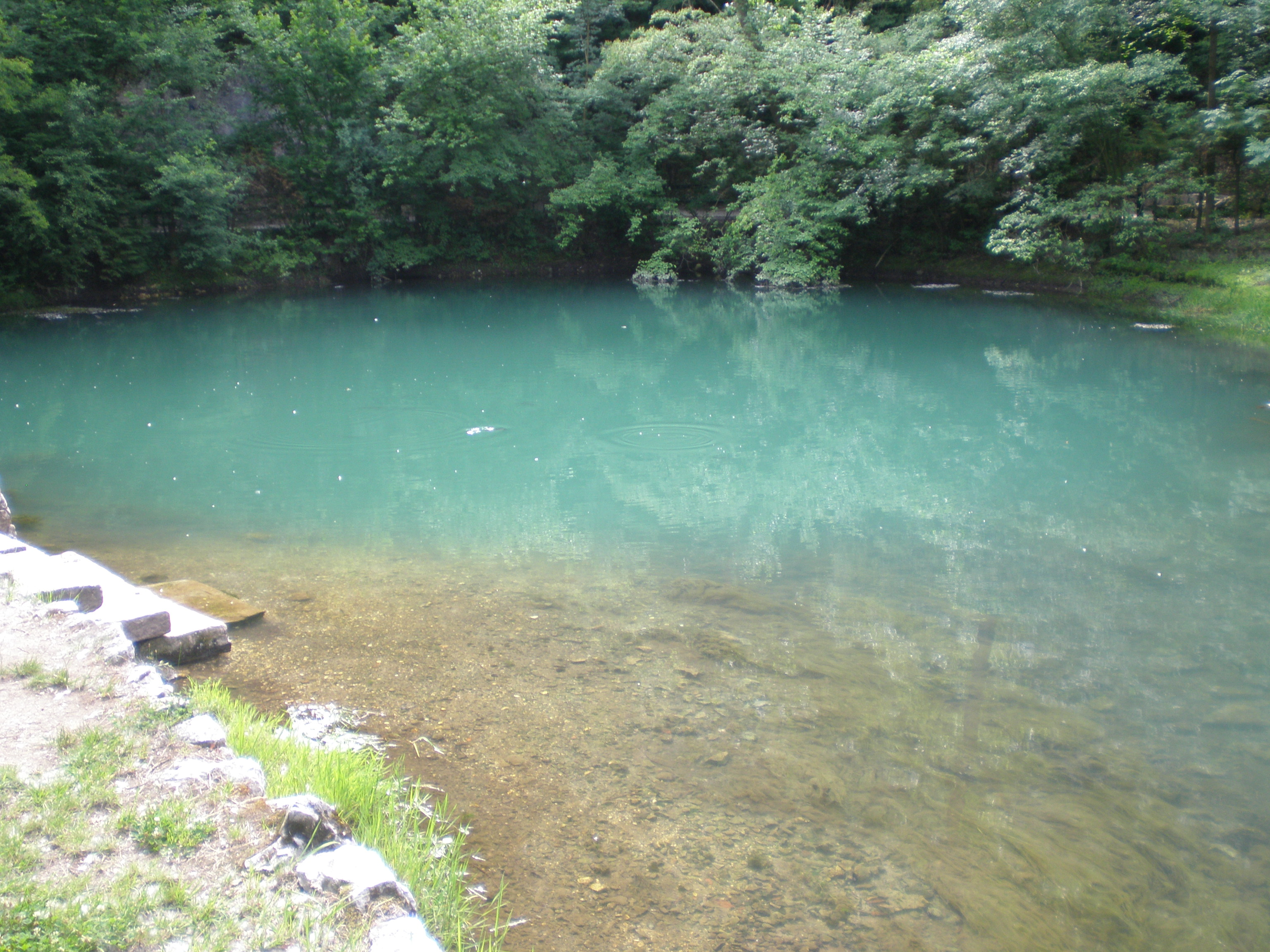 Извор реке Млаве у Жагубици.